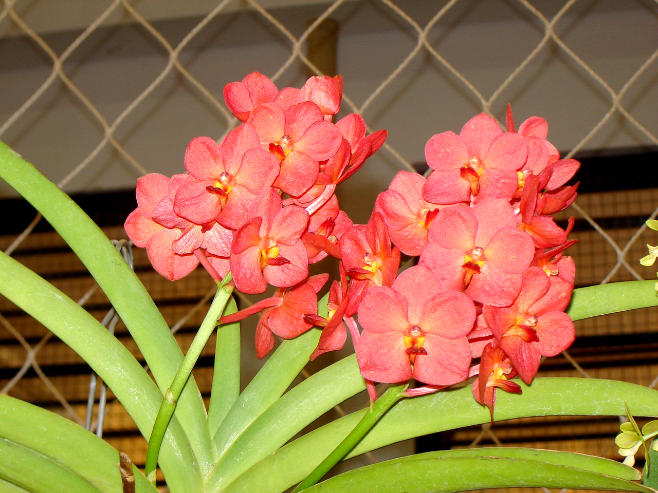 Ascocenda, orquídea (Vanda cultivar).